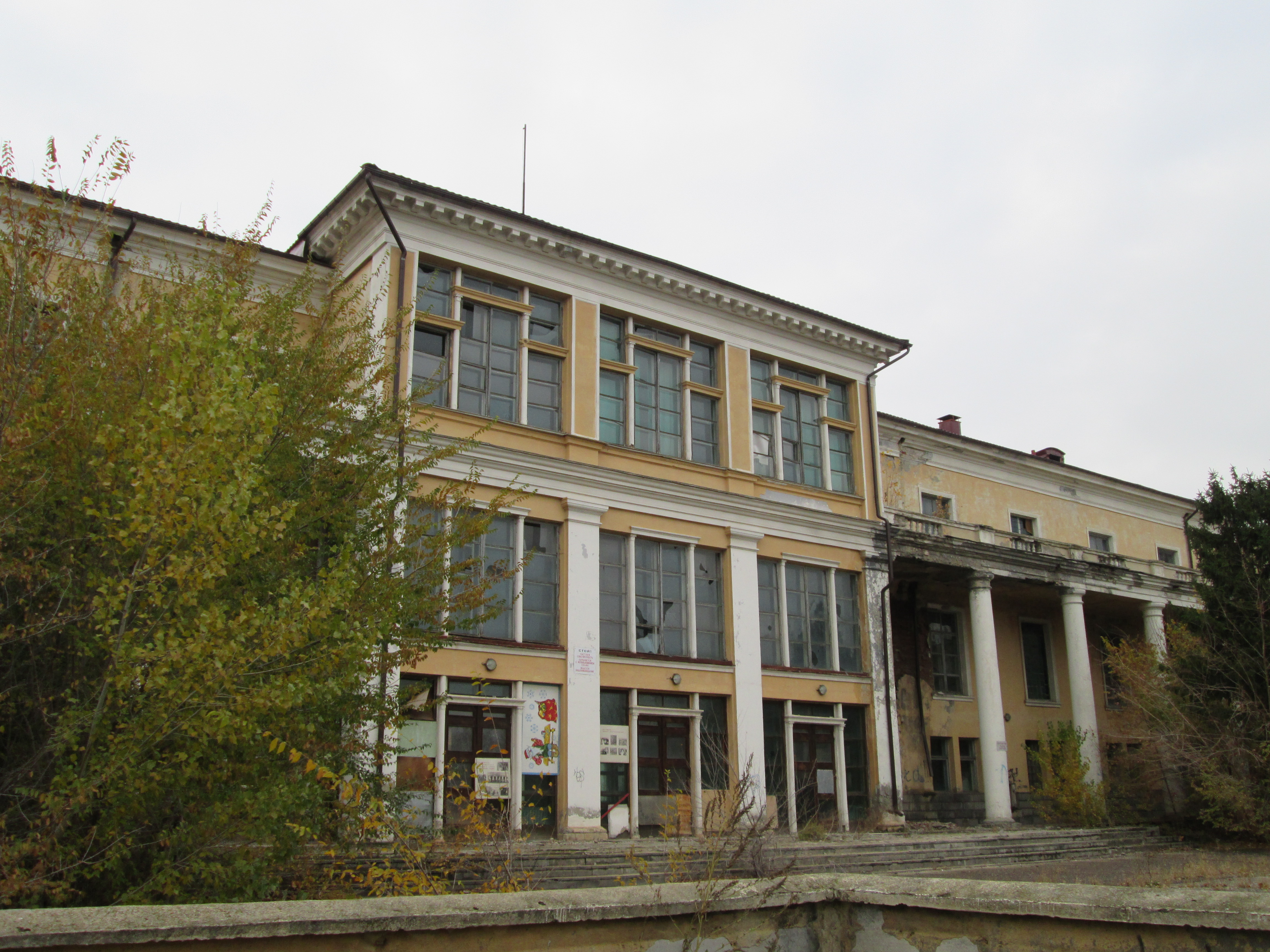 Дом культуры и техники АО ВГТЗ